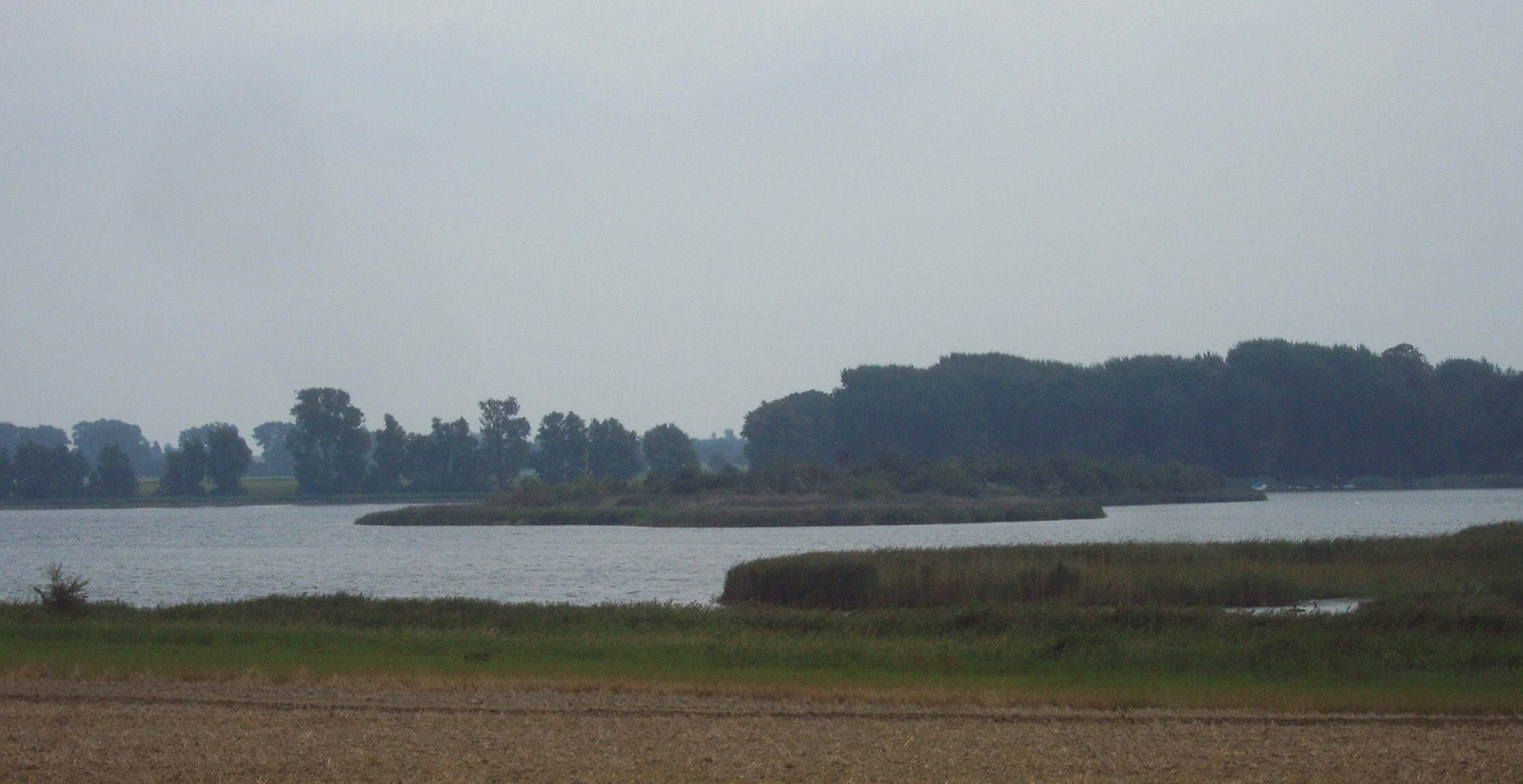 Insel Tollow, Zudar, Insel Rügen Deutschland